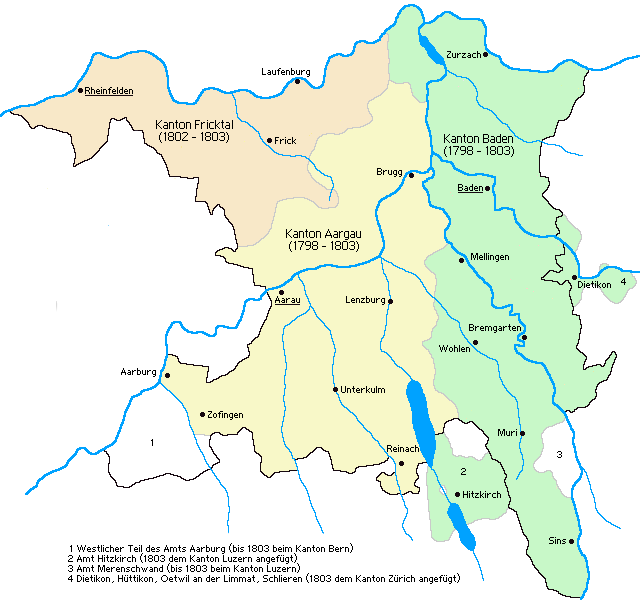 Der Kanton Aargau während der Helvetischen Republik 1798 - 1803 erstellt durch Voyager